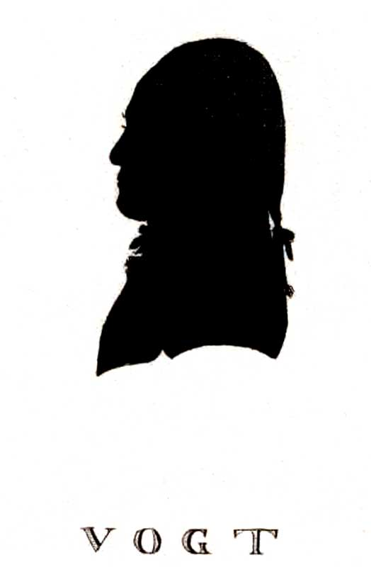 Scherenschnitt der Traugott Karl August Vogt (1762-1807), deutscher Mediziner abbildet